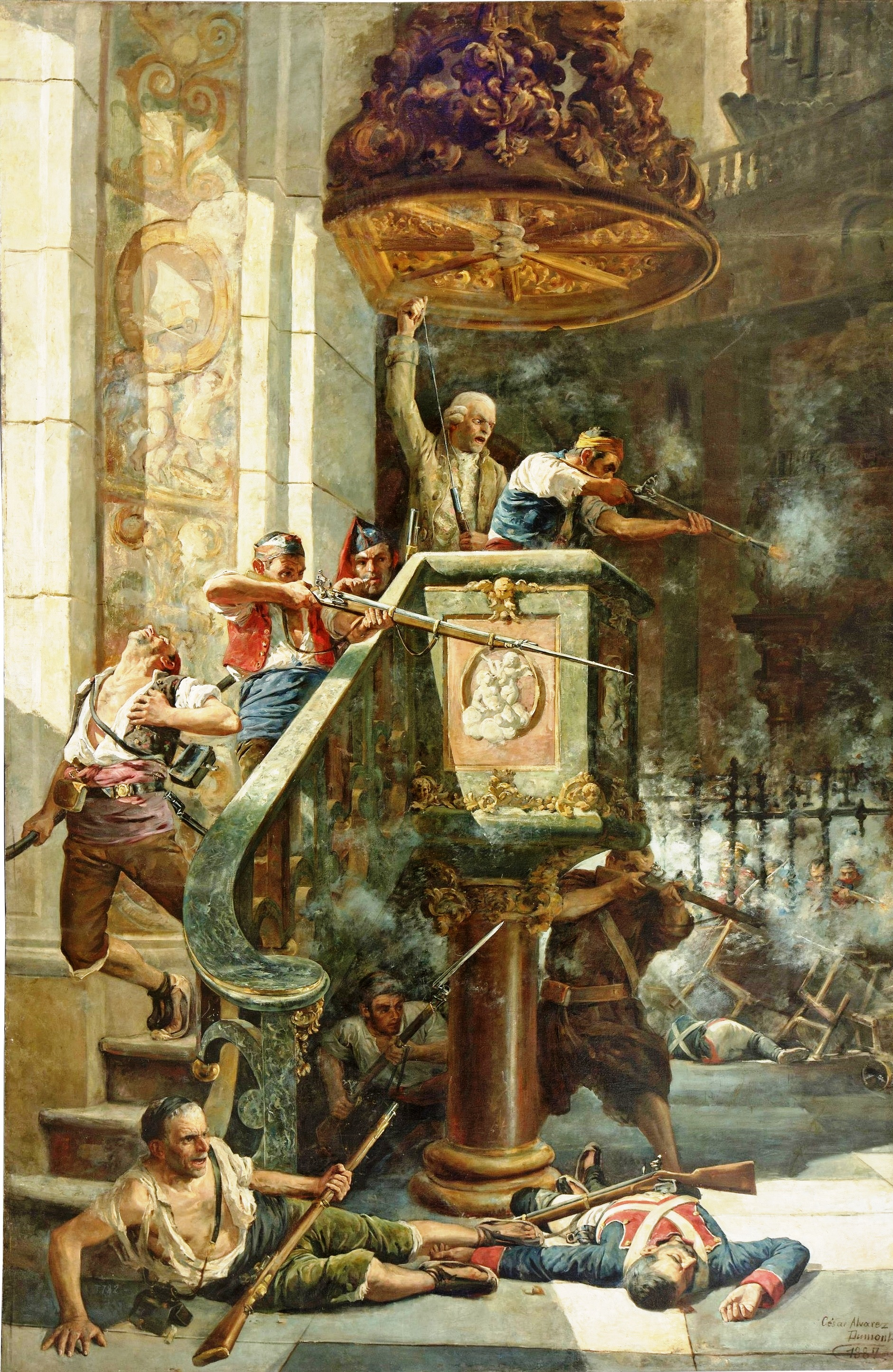 La obra representa al grupo de hombres que se hicieron fuertes en el interior del convento de San Agustín de Zaragoza y resistieron los ataques del ejército francés durante los Sitios de Zaragoza, que tuvieron lugar durante la Guerra de la Independencia Española.